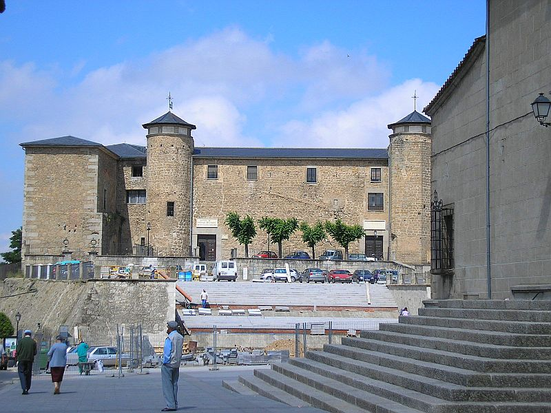 Palacio Ducal de Béjar